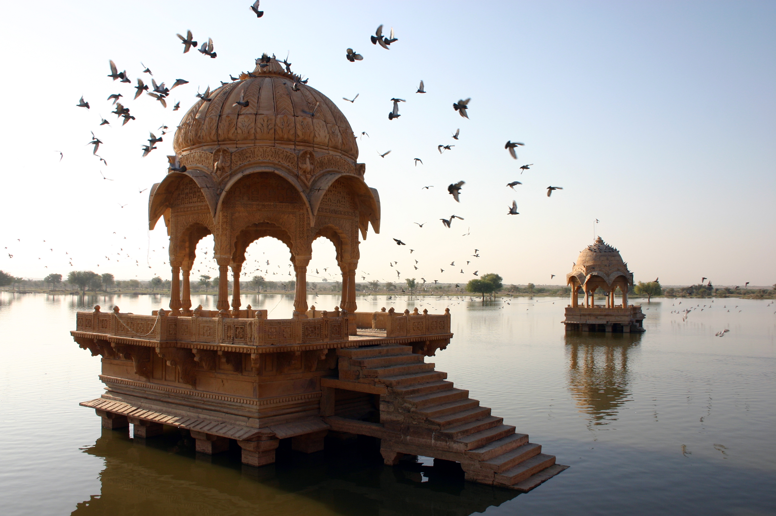 See der Anlage Amar Sagar in Nordwesten von Jaisalmer / Rajasthan